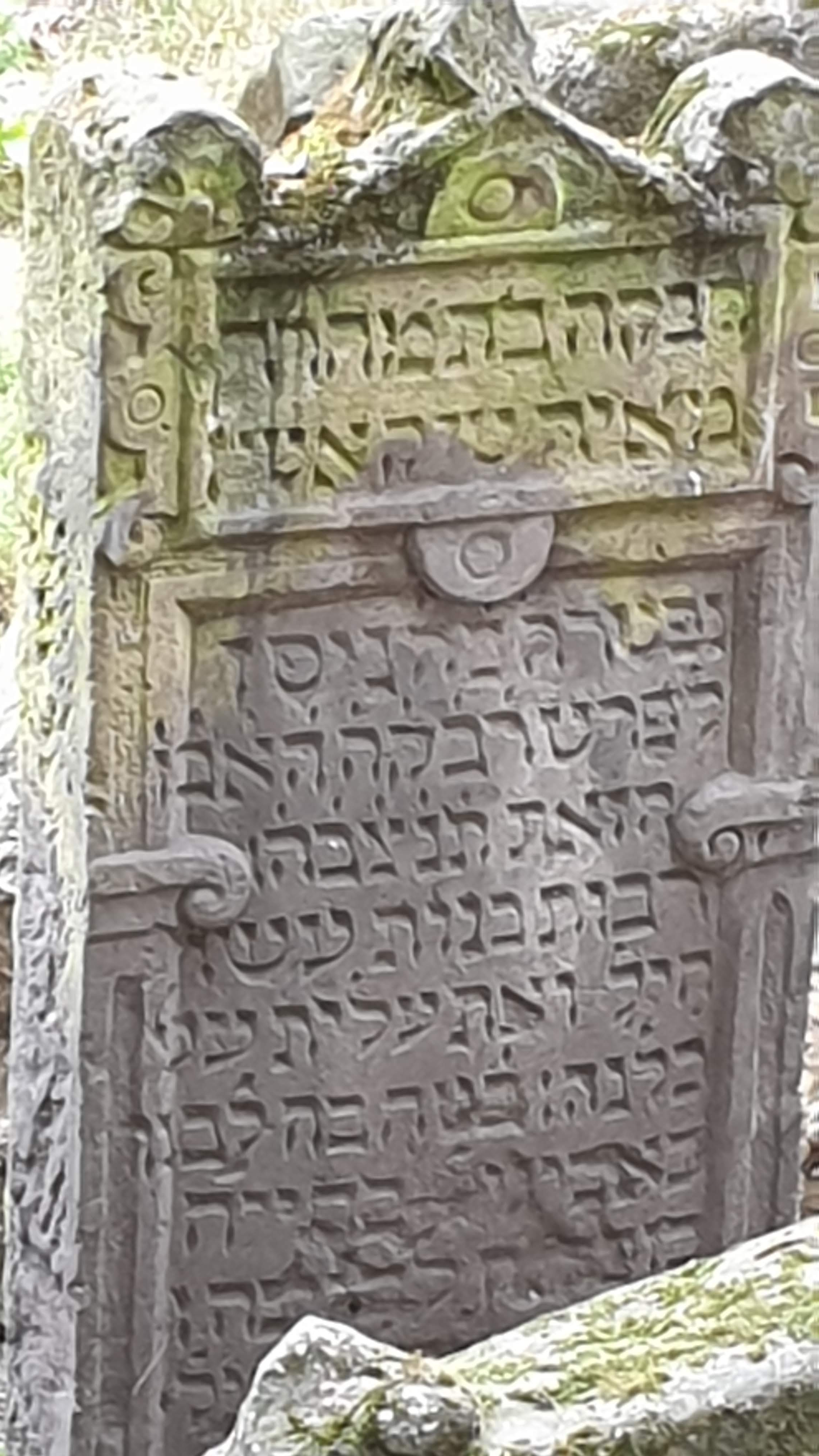 תמונת הקבר של רבקה בת מאיר טיקטינר בפראג שברפובליקה הצ'כית